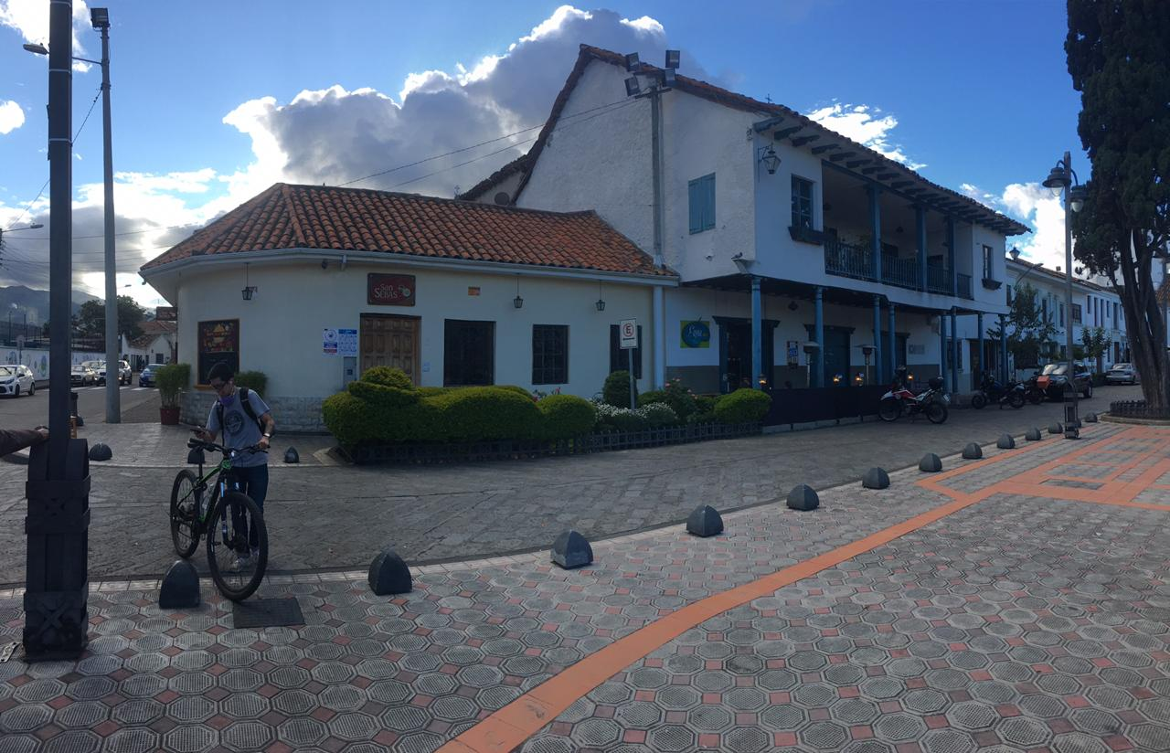 restaurantes que se pueden encontrar en la parroquiade San Sebastian